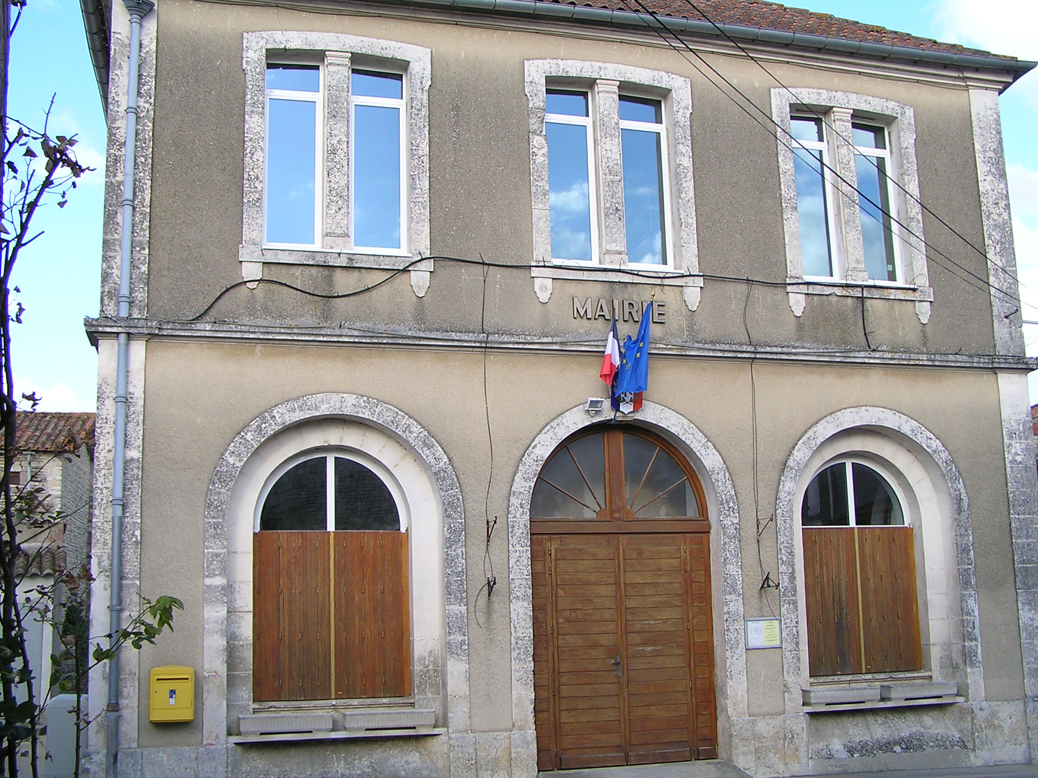 mairie d'Anais